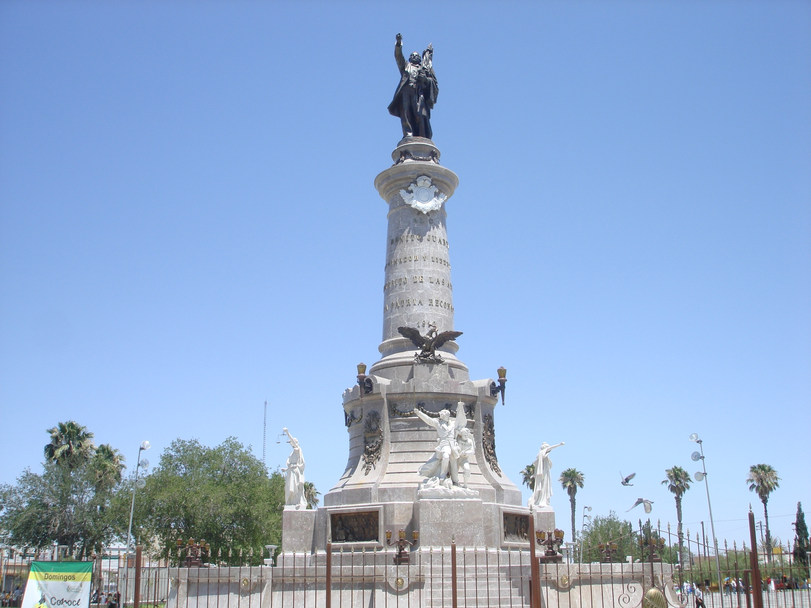 Monumento a Benito Juárez en Ciudad Juárez Chihuahua, México, inaugurado en 1910 con motivo del centenario de la Independencia de México.